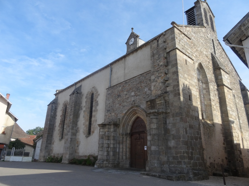 Église Saint-Victurien